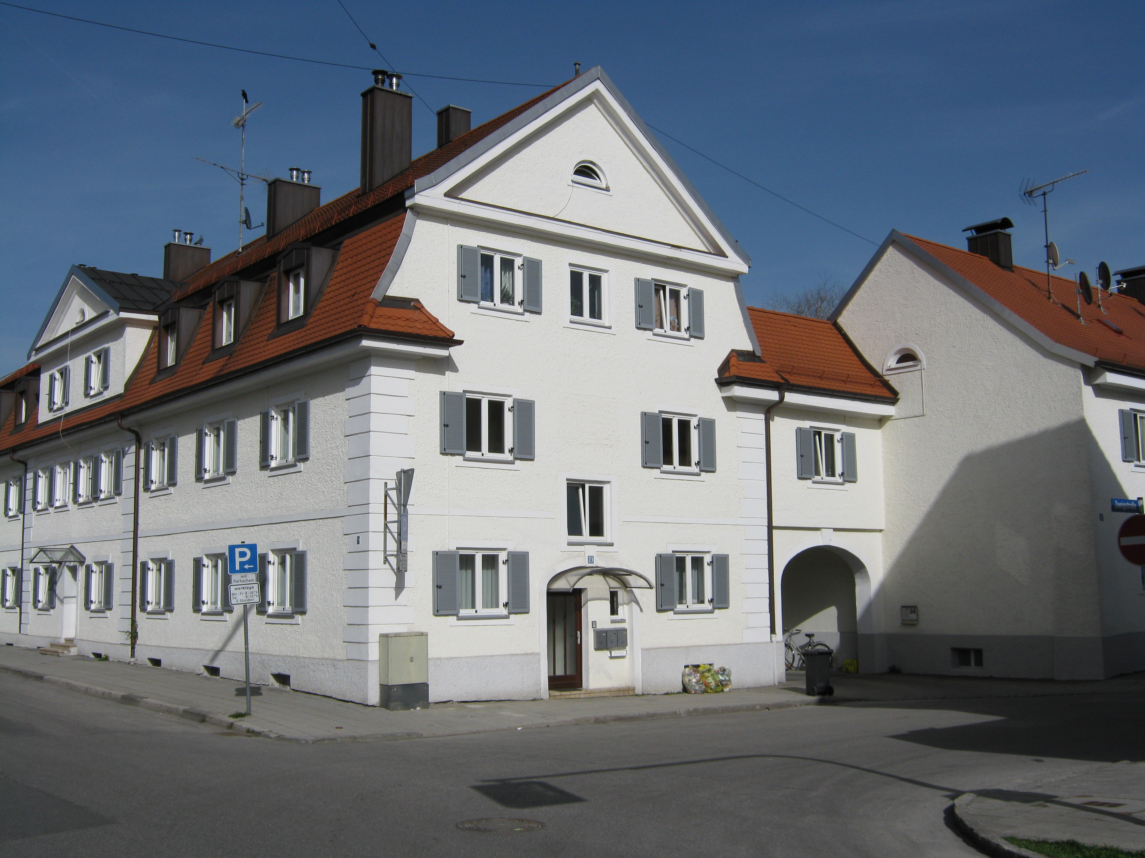 Penzberg-Denkmalgeschützte Häuser Ehemalige Polizeistation, Penzberg, Philippstraße 19/21/23